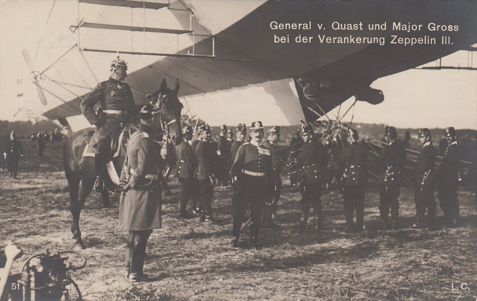 Alexander Ferdinand Ludolf von Quast (1850 - 1939), preußischer General der Infanterie und Armeeoberbefehlshaber im Ersten Weltkrieg.